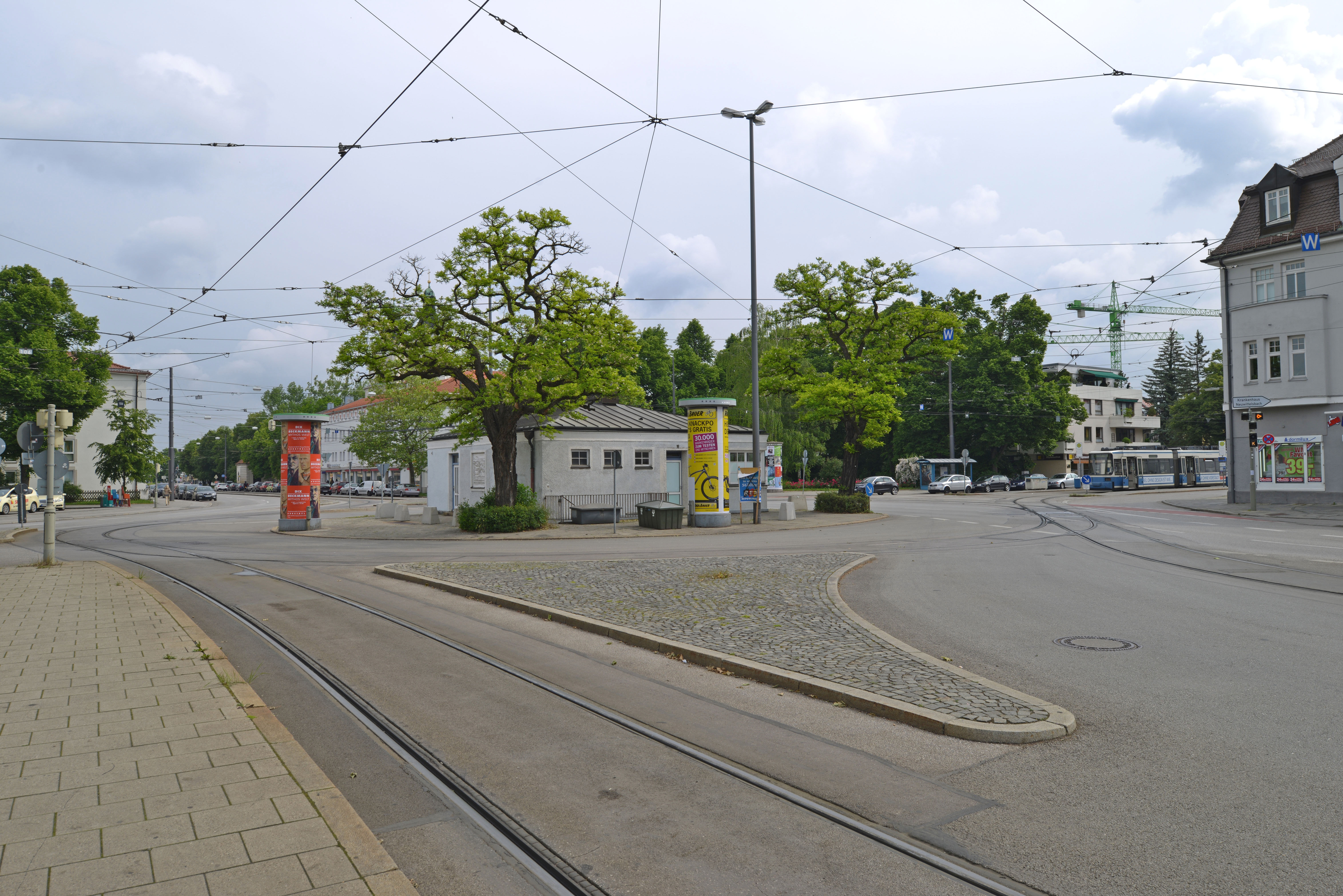 München, Der Blick fällt von der Trambahn-, und Linienbushaltestelle auf den Mittelpunkt des Romanplatzes mit dem im Jahr 1928 erbauten Stationshaus und stillgelegter öffentlichen Bedürfnisanstalt. Rechter Hand fällt der Blick in die Romanstraße an dessen Haltestelle Romanplatz die Trambahnlinie 12 mit einem R-2 Wagen 2105 auf ihre Weiterfahrt zum Scheidplatz wartet.